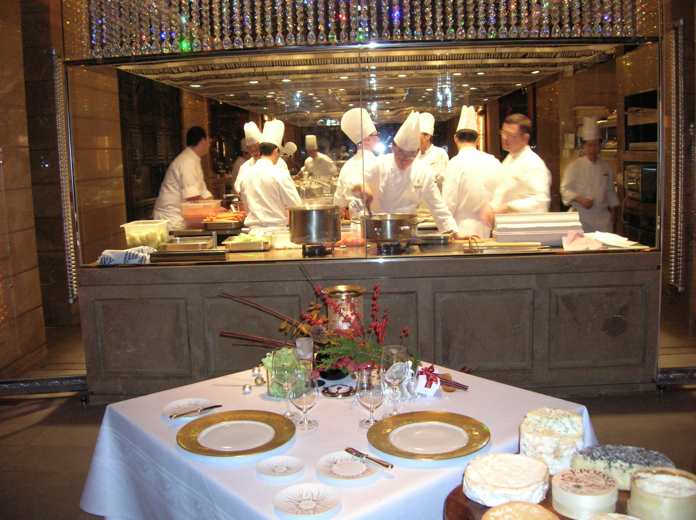 המטבח הפתוח במסעדת קפריס בהונג קונג